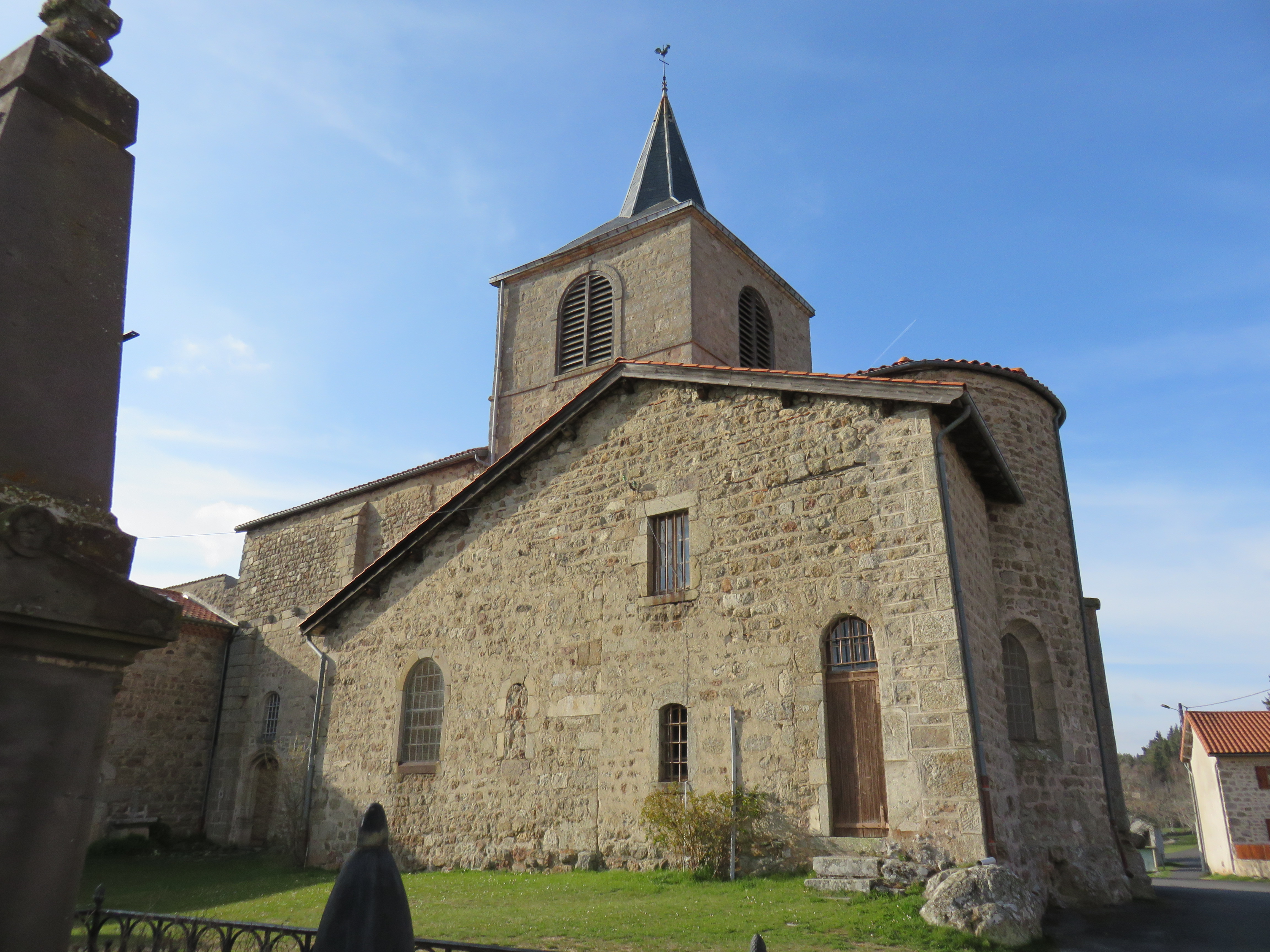 Église Saint-Jean-Baptiste de La Chaulme, dans le Puy-de-Dôme.